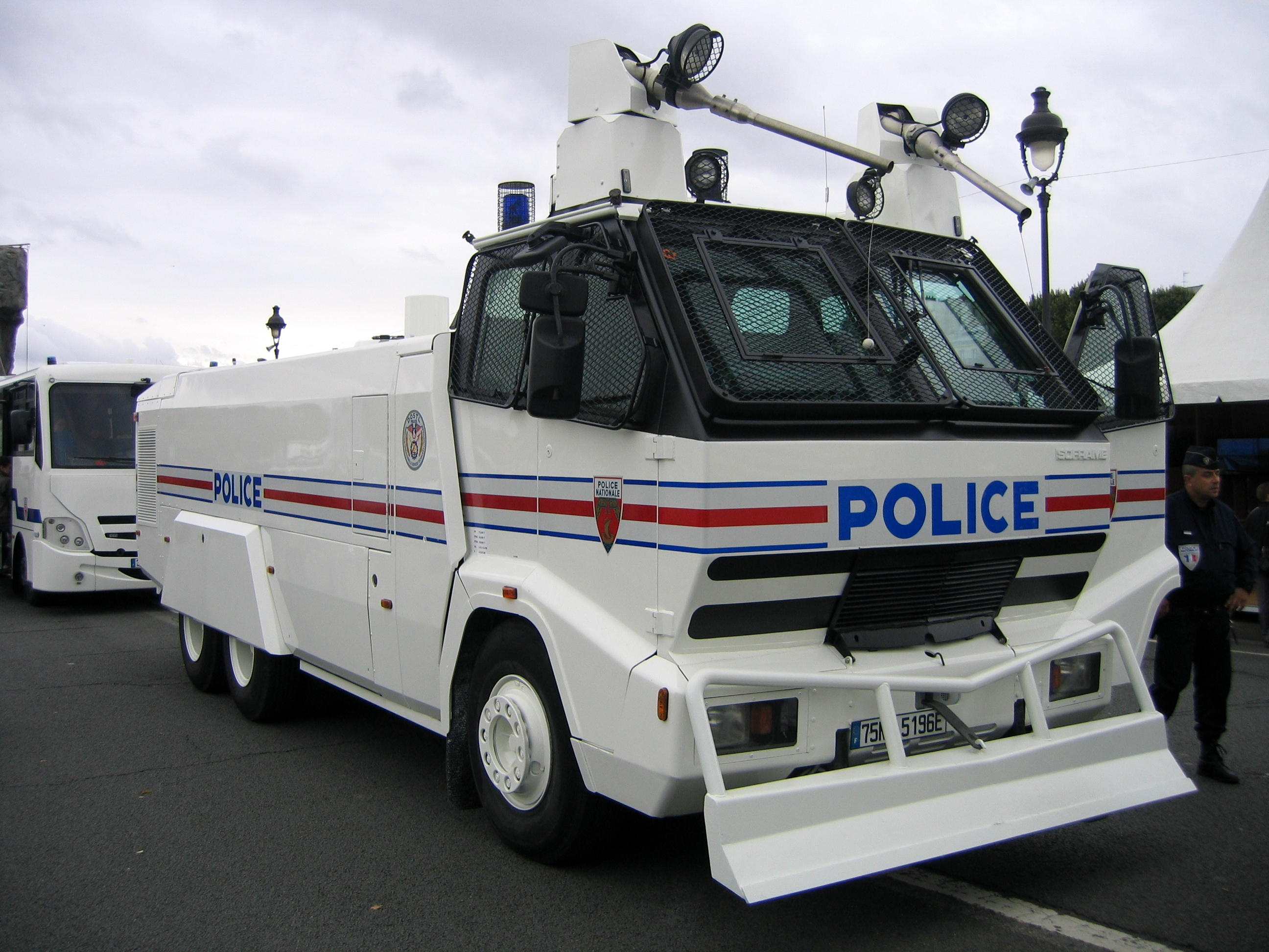 Camion avec canons à eau lors des journées de sécurité intérieures 2009 sur l'esplanade des Invalides.